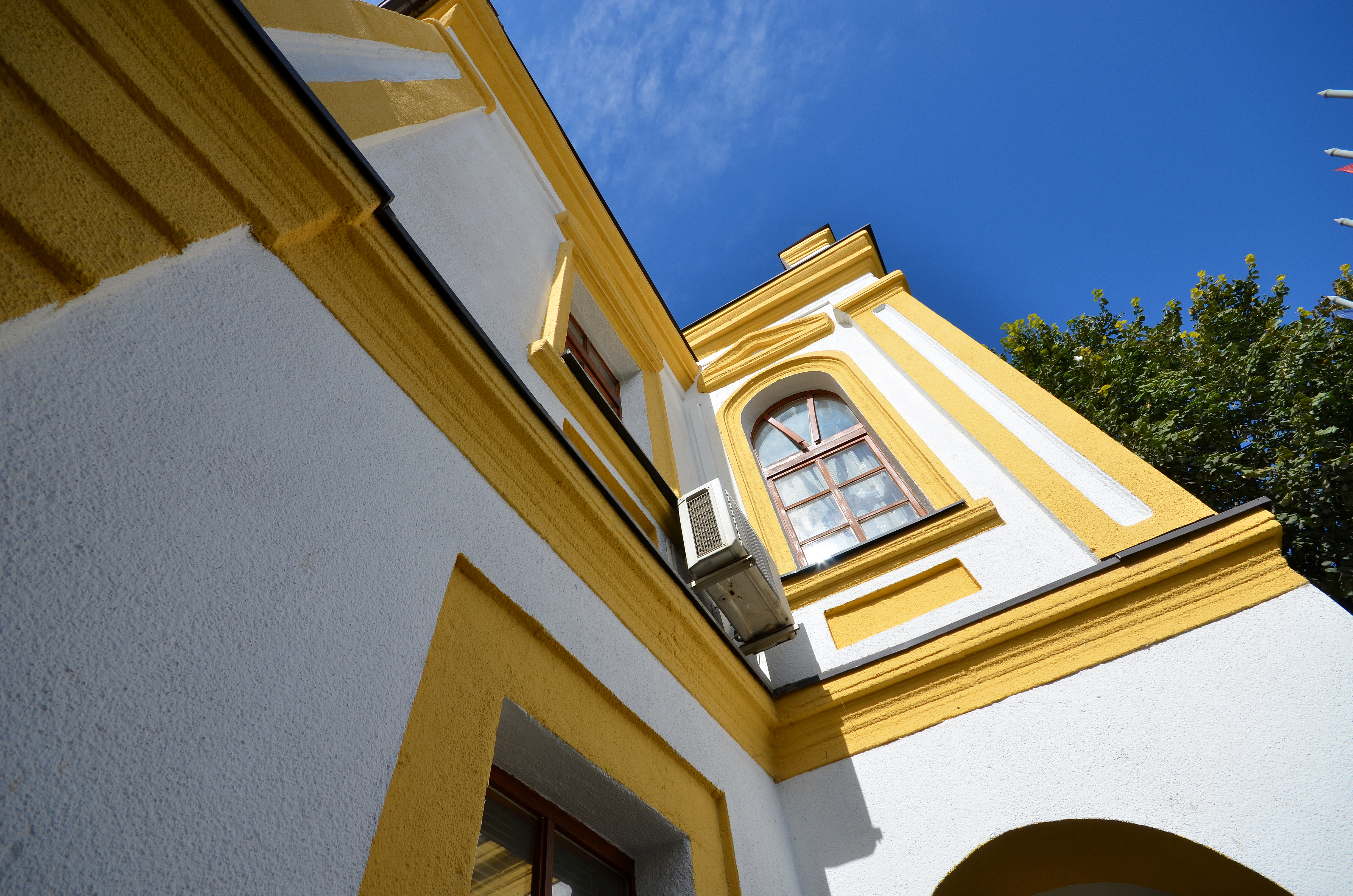 Objekti i Kajmekamllakut